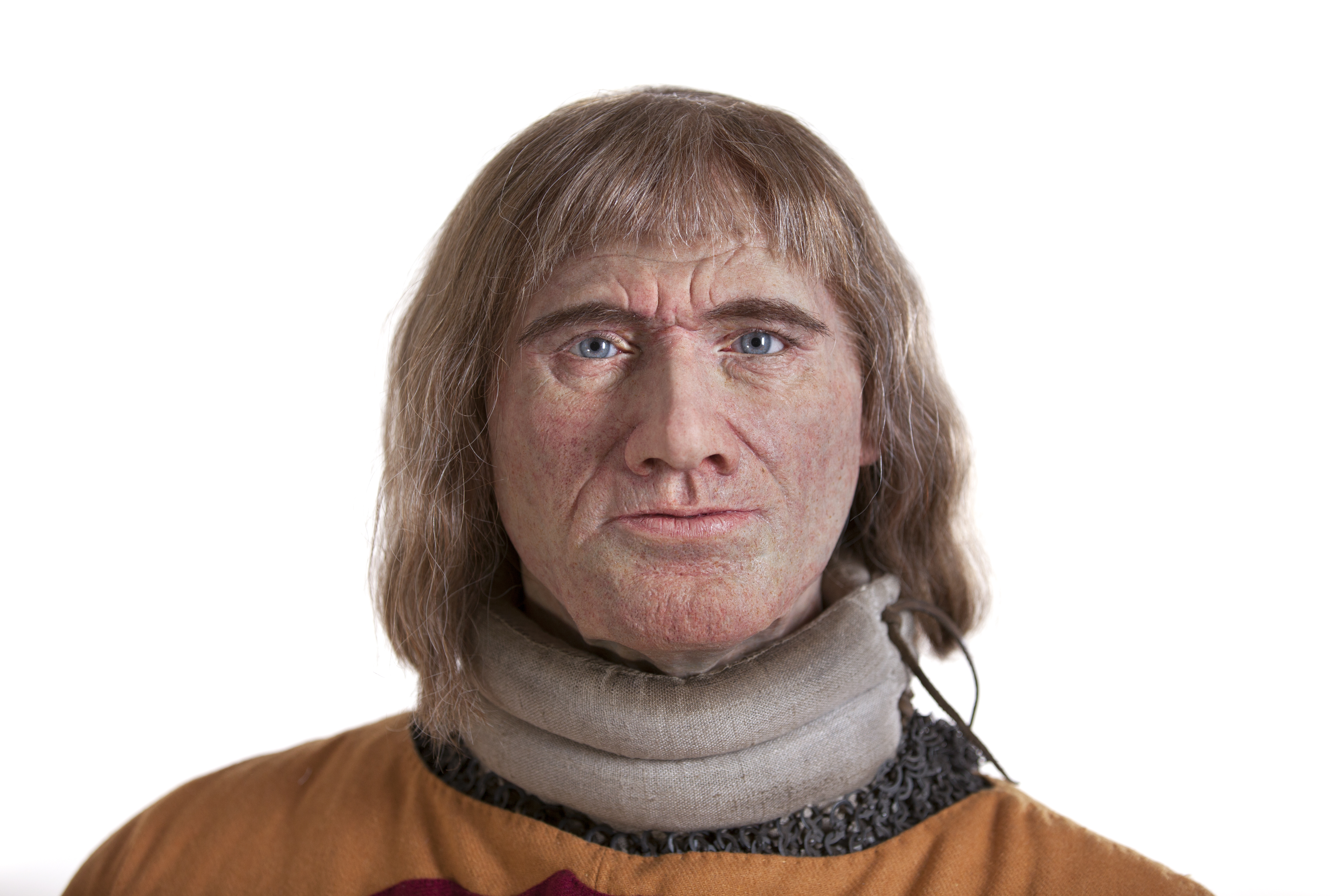 Willem I van Brederode, gezichtsreconstructie op basis van zijn skelet, collectie Provinciaal depot voor archeologie Noord-Holland, Huis van Hilde, Castricum, inventarisnummer R9560-01.